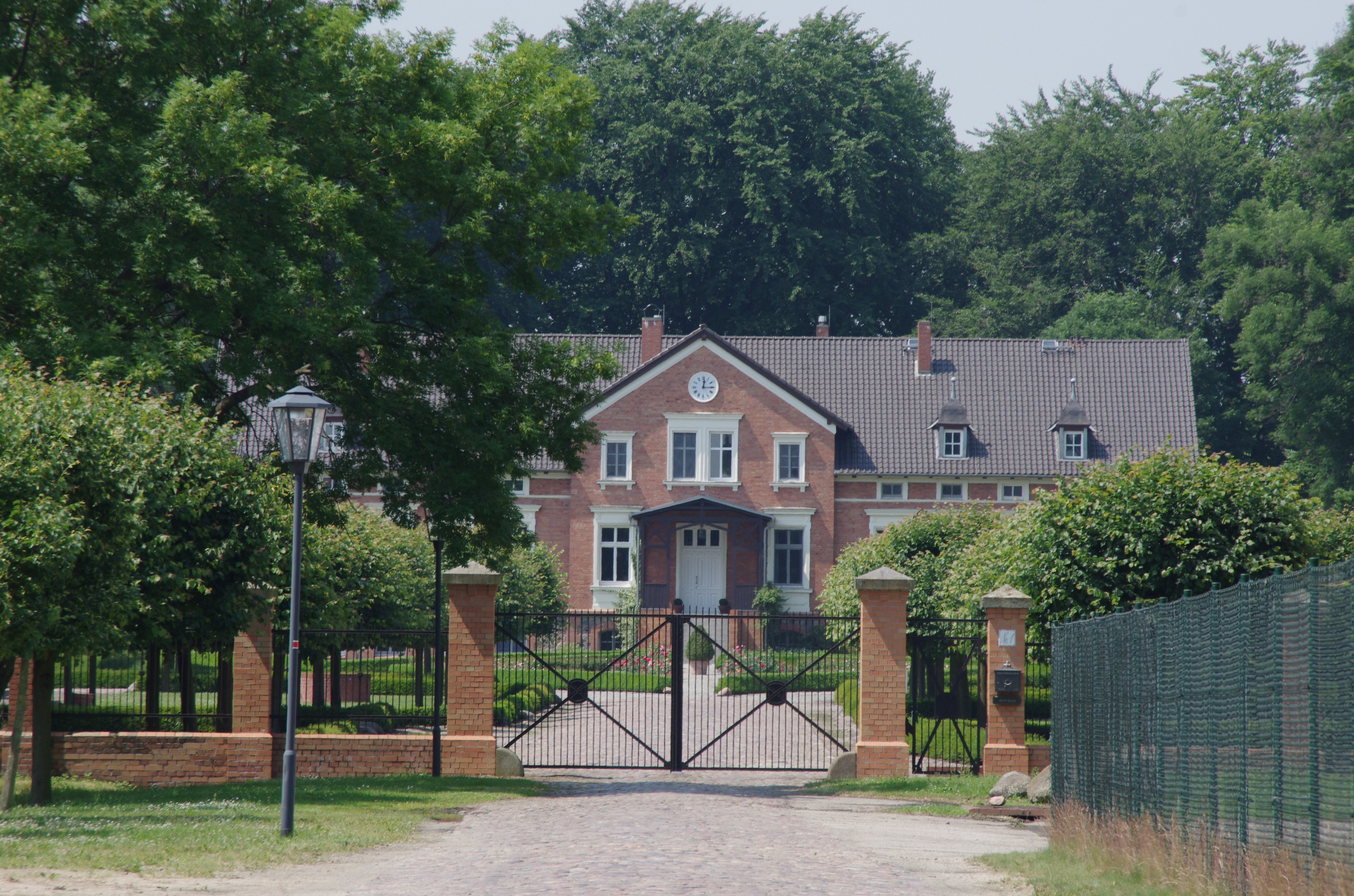 Luckau in Brandenburg. Das Gutshaus in Gölsdorf steht unter Denkmalschutz.